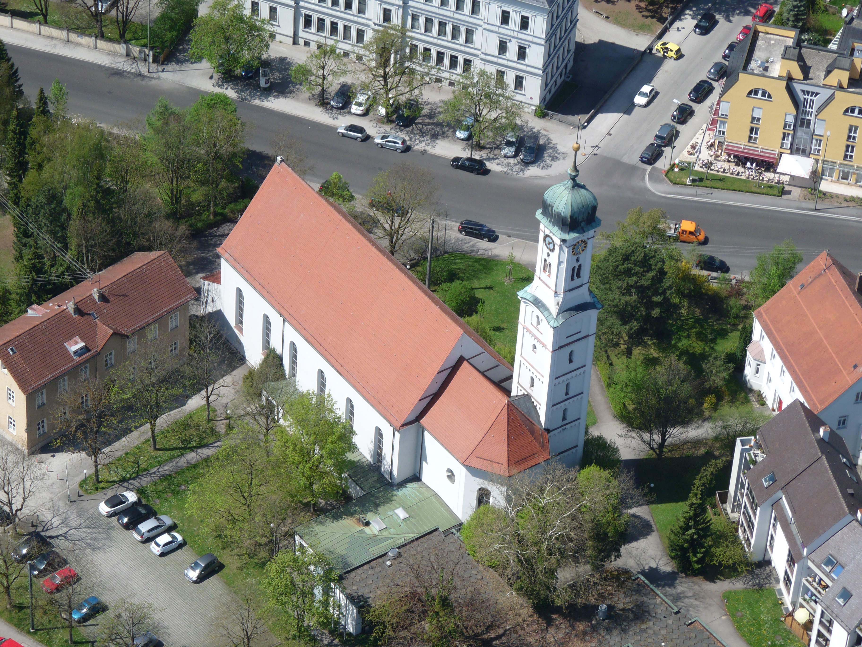 St. Georg und Michael 100428